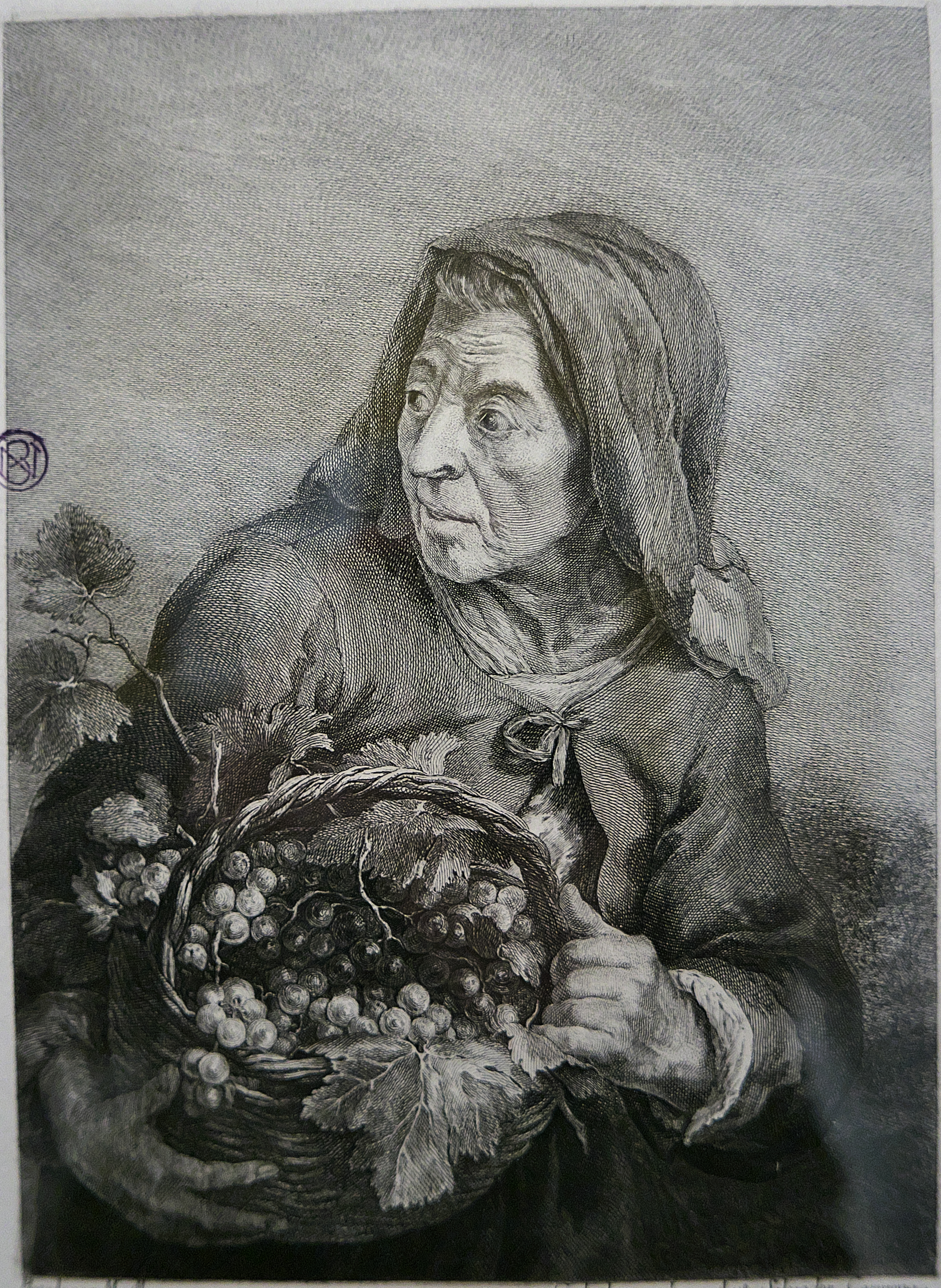 Juan Antonio Salvador Carmona (ca 1768) reproduce la pintura de Murillo con este grabado al aguafuerte y buril sobre papel verjurado.